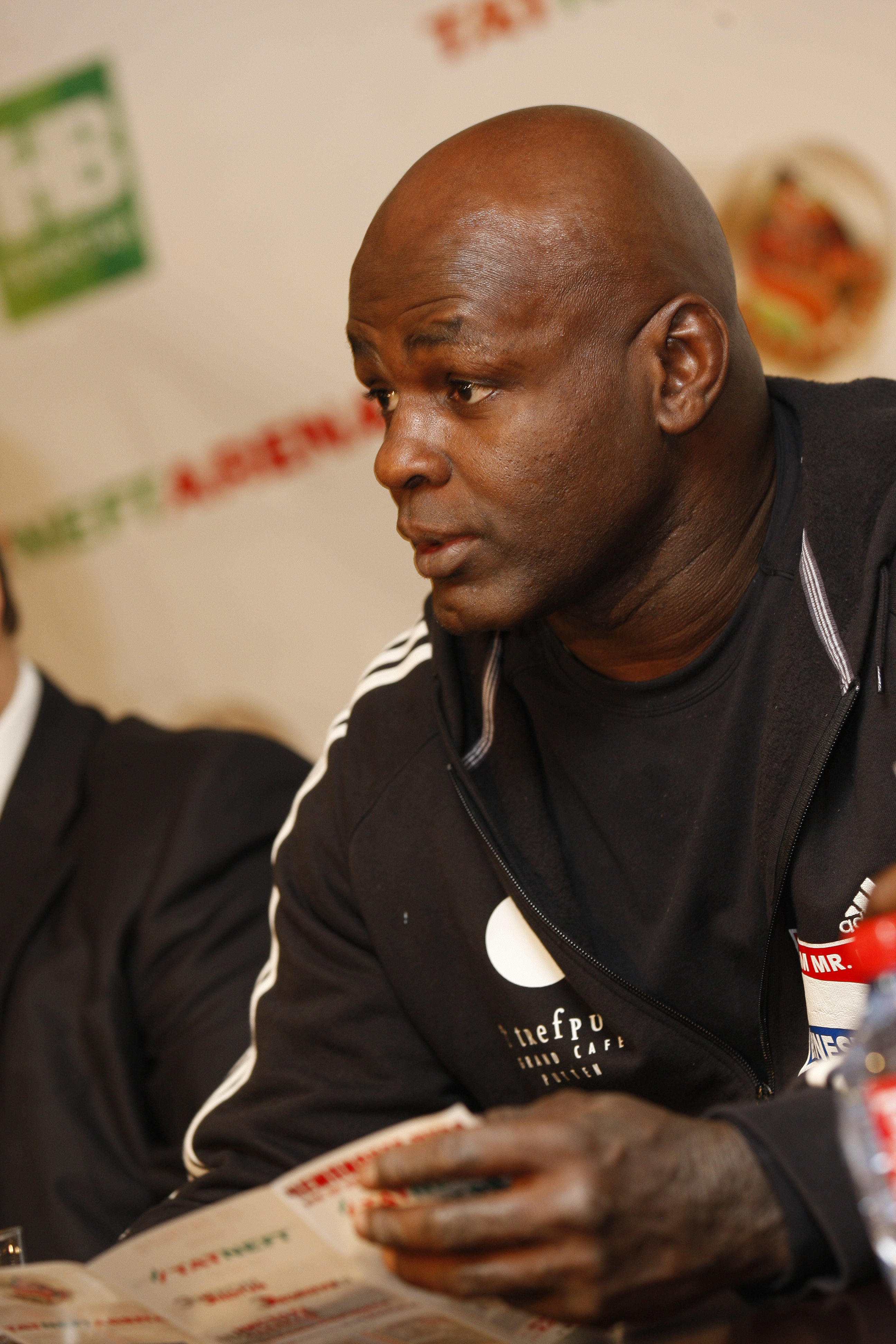 Эрнесто Хуст в Казани на TNA